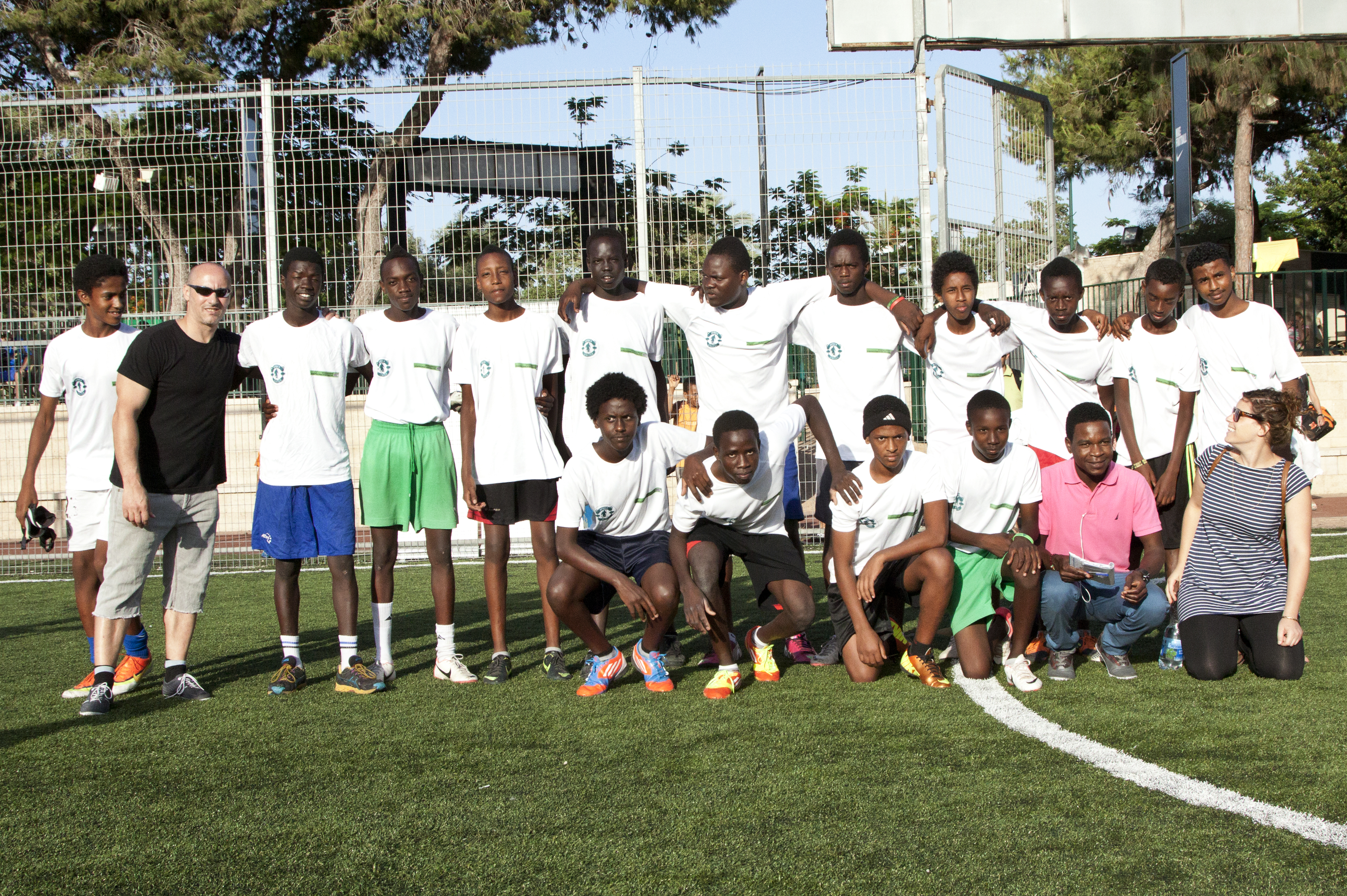 קבוצת הנוער של א.ס.ף משתתפת בטורניר קטרגל